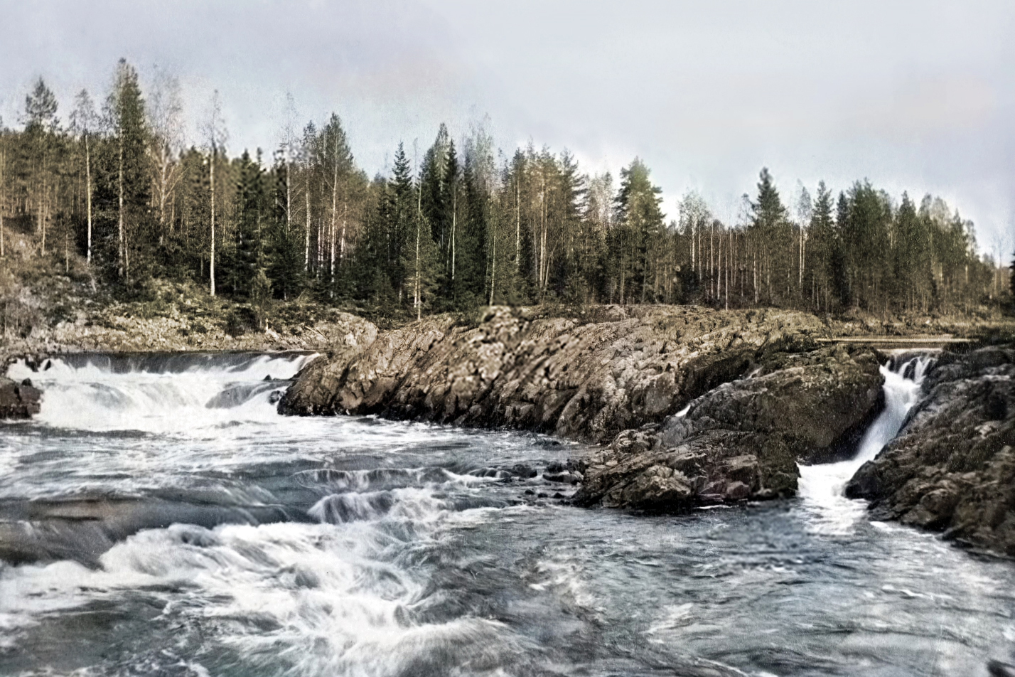 Порог Янисйоки, 1899 год. Тогда река называлась Jananus.